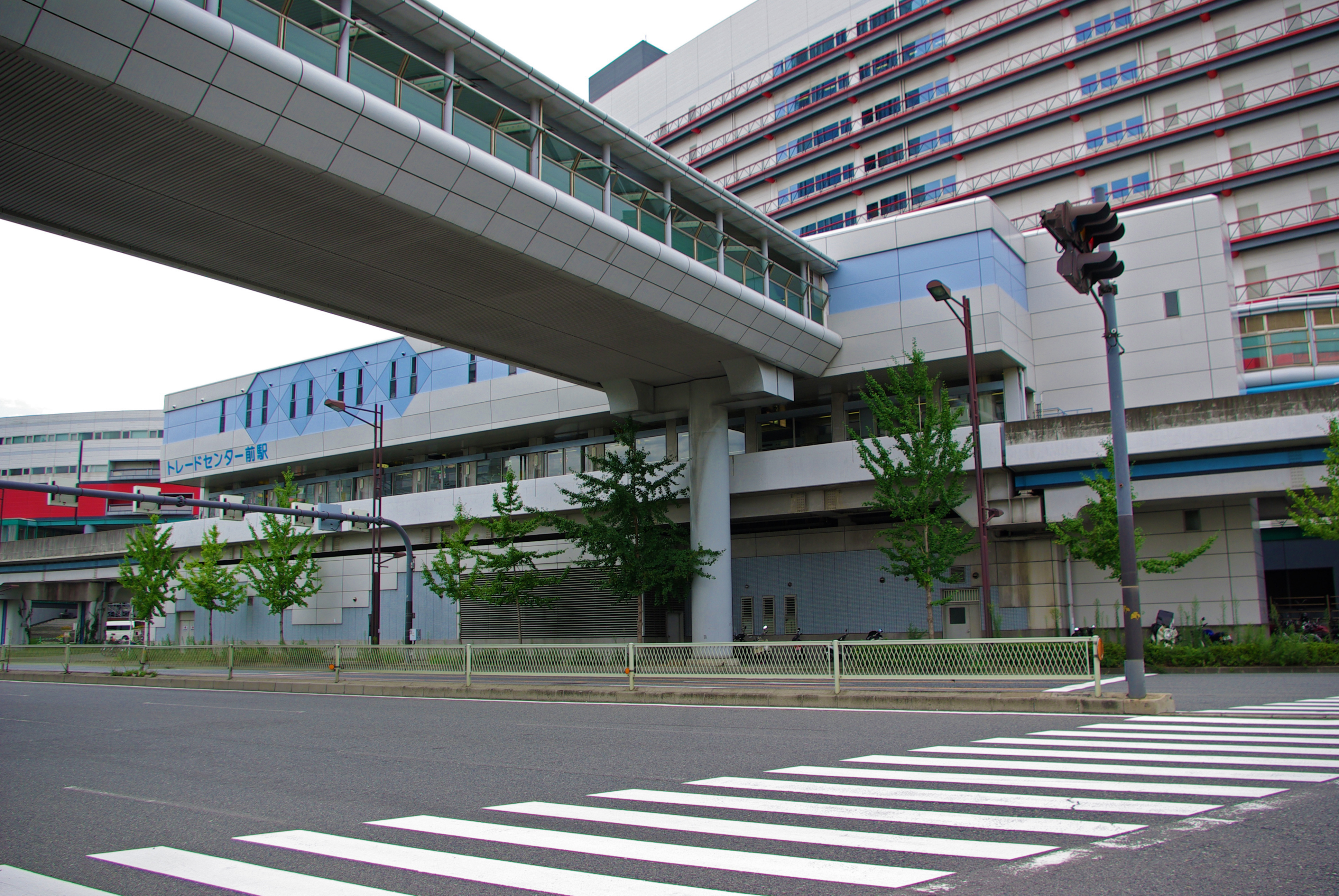 大阪市交通局南港ポートタウン線トレードセンター前駅